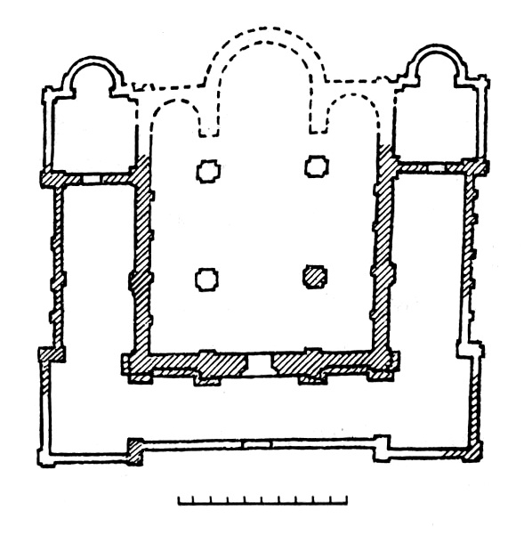 Храм-пахавальня полацкіх епіскапаў